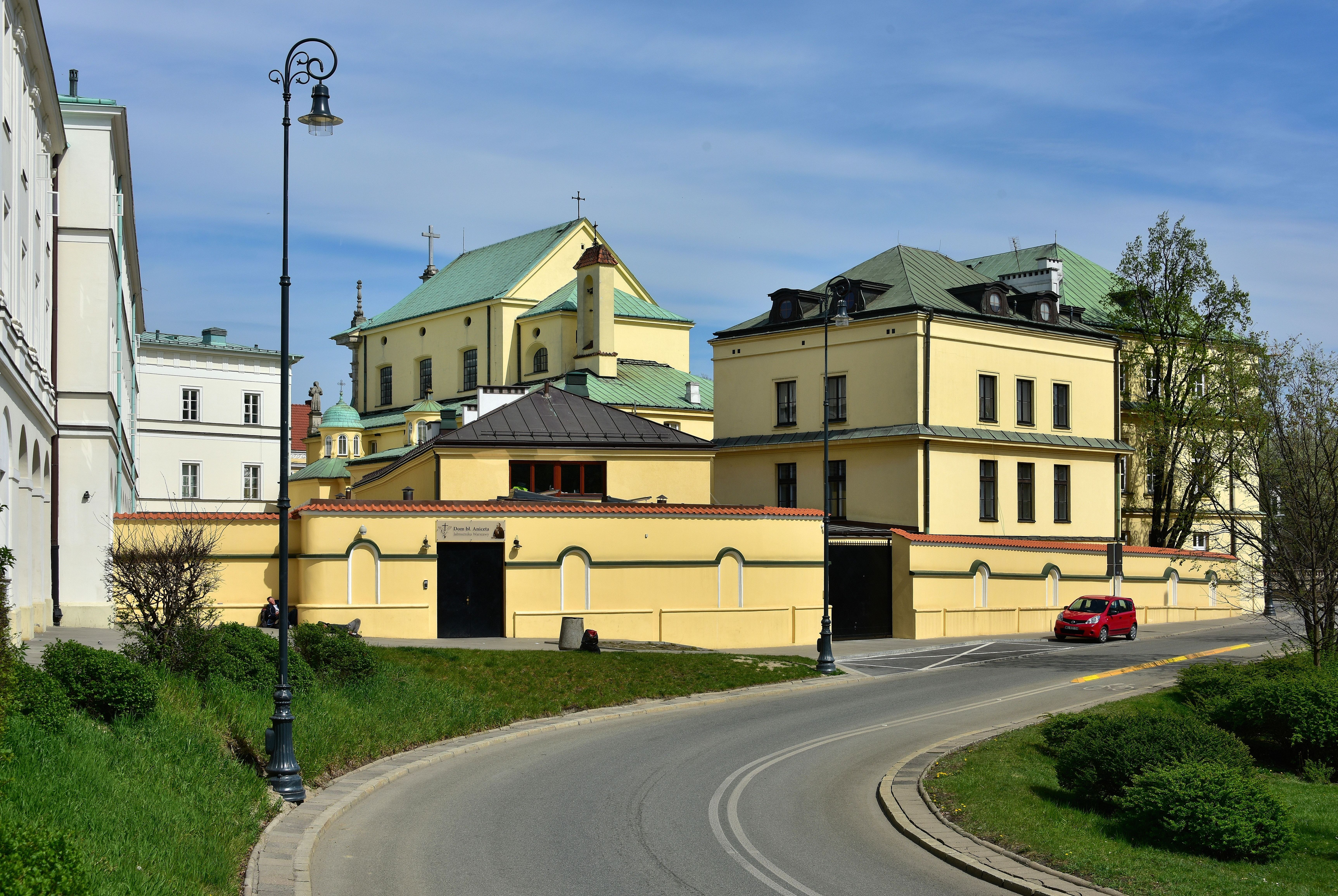 Zespół klasztoru Braci Mniejszych Kapucynów przy ul. Kapucyńskiej 4 w Warszawie